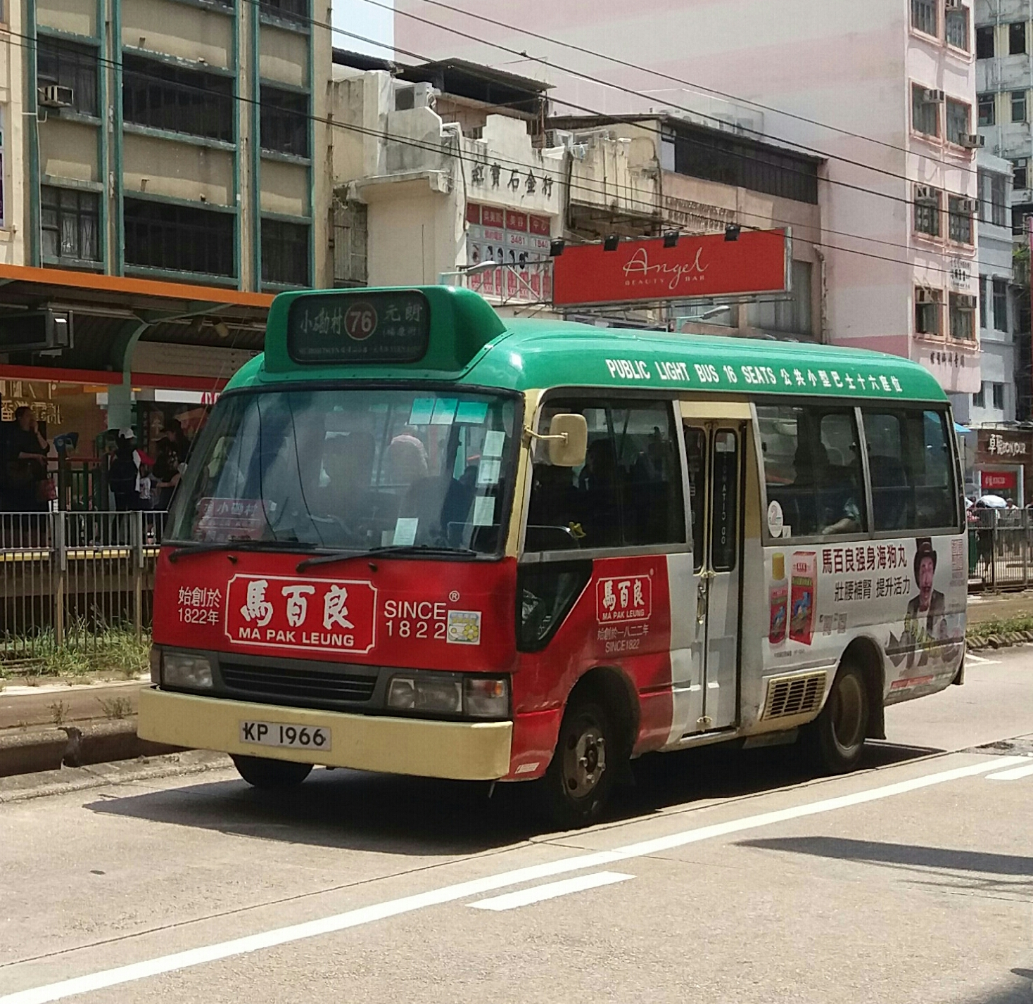 中文（香港）: 新界區專線小巴76線，在元朗大馬路行駛中